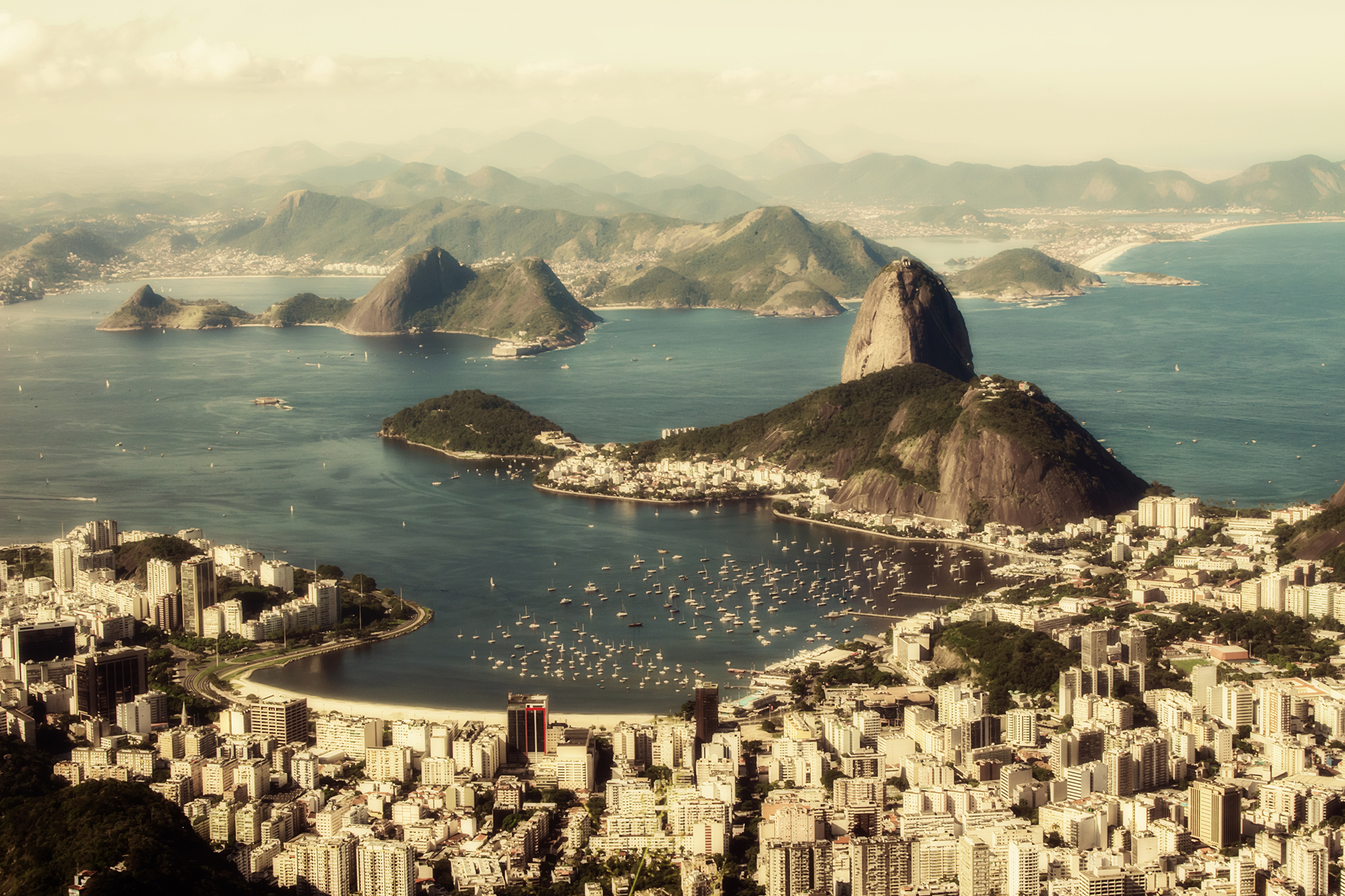 Baía de Guanabara vista do alto do Corcovado